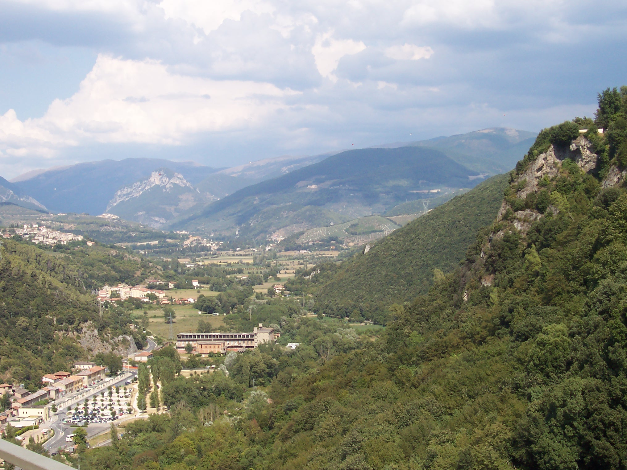 la Valnerina à proximité de Terni, en direction de Torre Orsina et Arrone